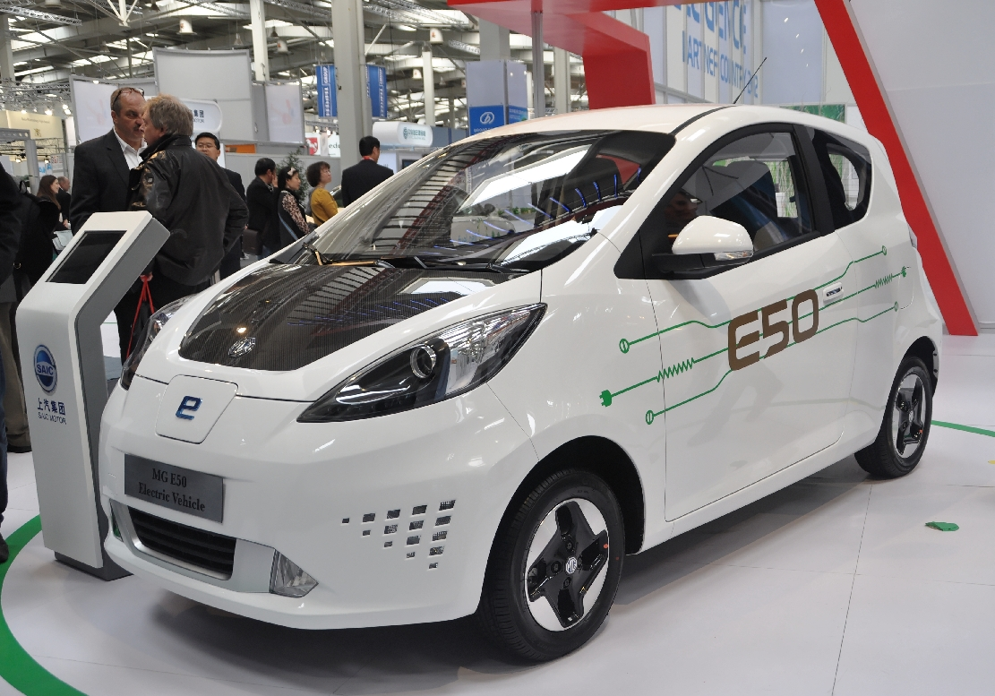 Hannover-Messe April 2012 Dieses Foto entstand durch die Mithilfe des gemeinnützigen Vereins Skillshare bei der Akkreditierung als Fotograf. Infos unter skillshare.eu Skillshare e.V. ist ein eingetragener gemeinnütziger Verein zur Förderung der Bildung durch Unterstützung der Erstellung, Sammlung und Verbreitung so genannten freien Wissens. IBAN: DE16 8306 5408 0004 8850 66 BIC: GENODEF1SLR Bank: VR-Bank Altenburger Land